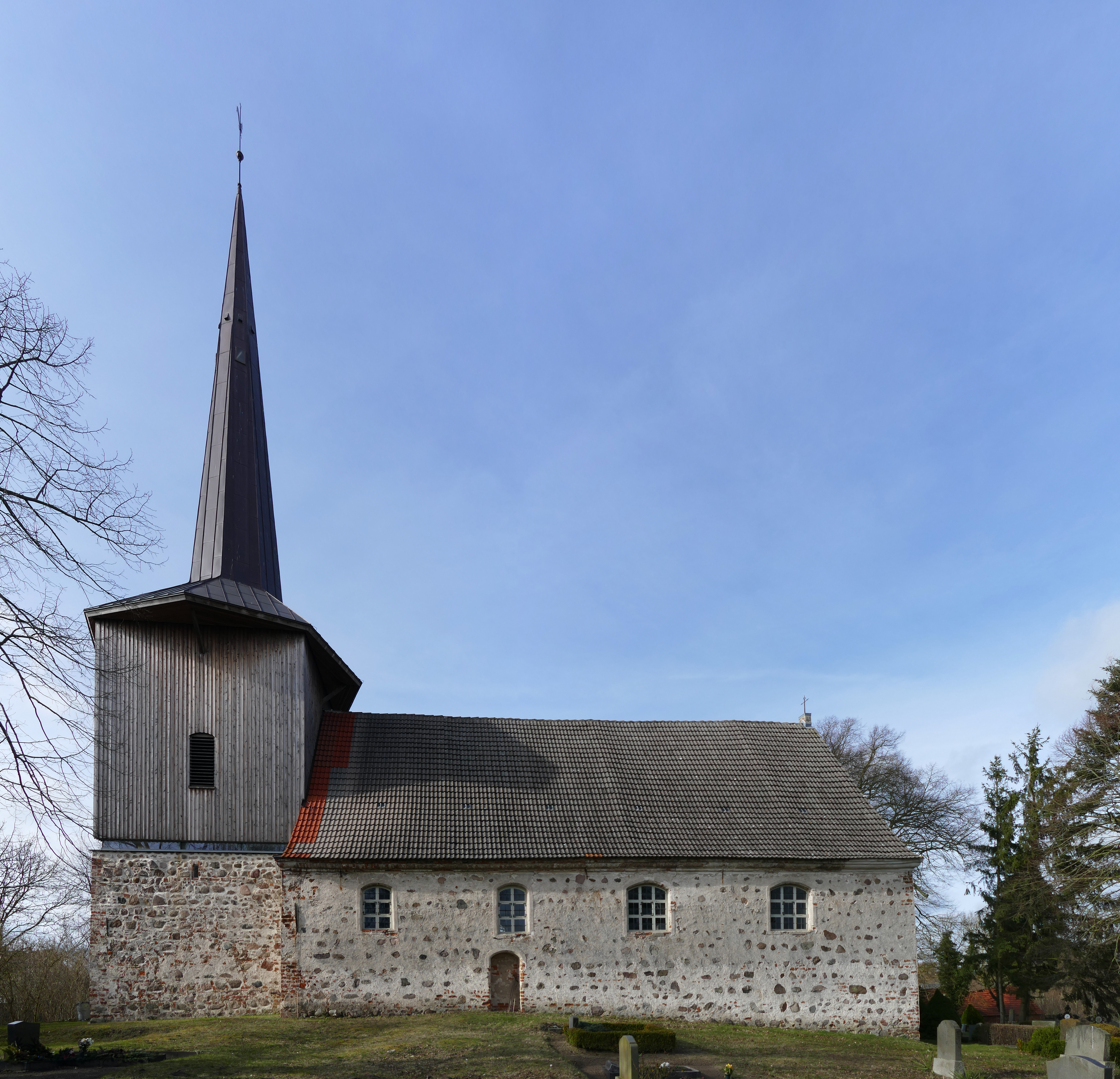 Kirche Lindenberg , Ansicht von Süden